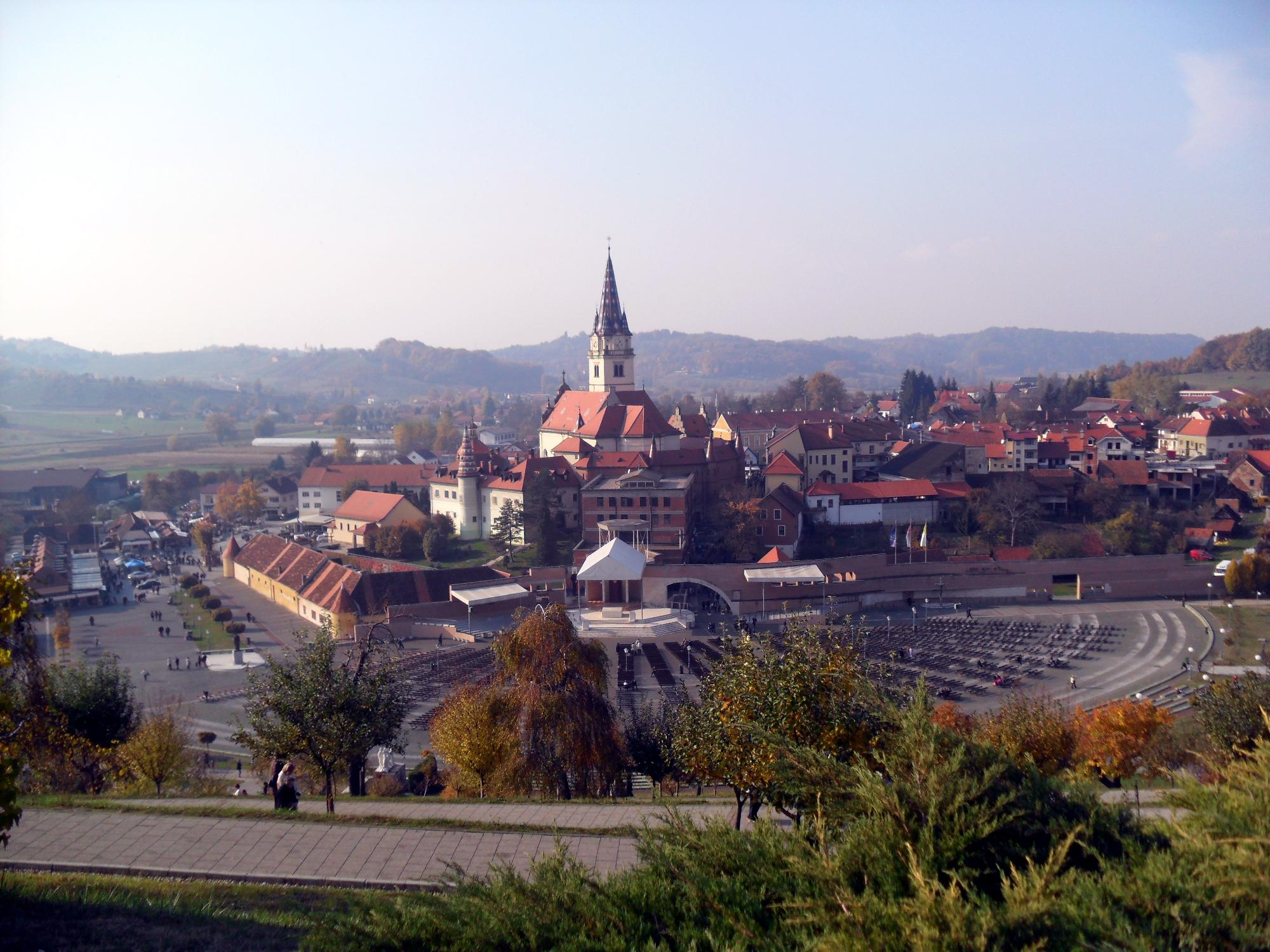 30.10.2011. _ Marija Bistrica